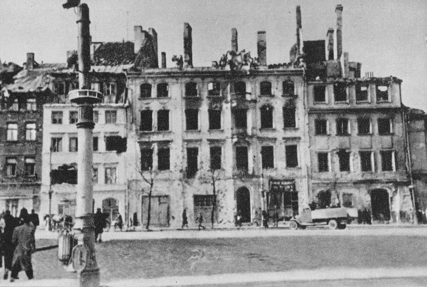 Krakowskie Przedmieście podczas obrony Warszawy we wrześniu 1939